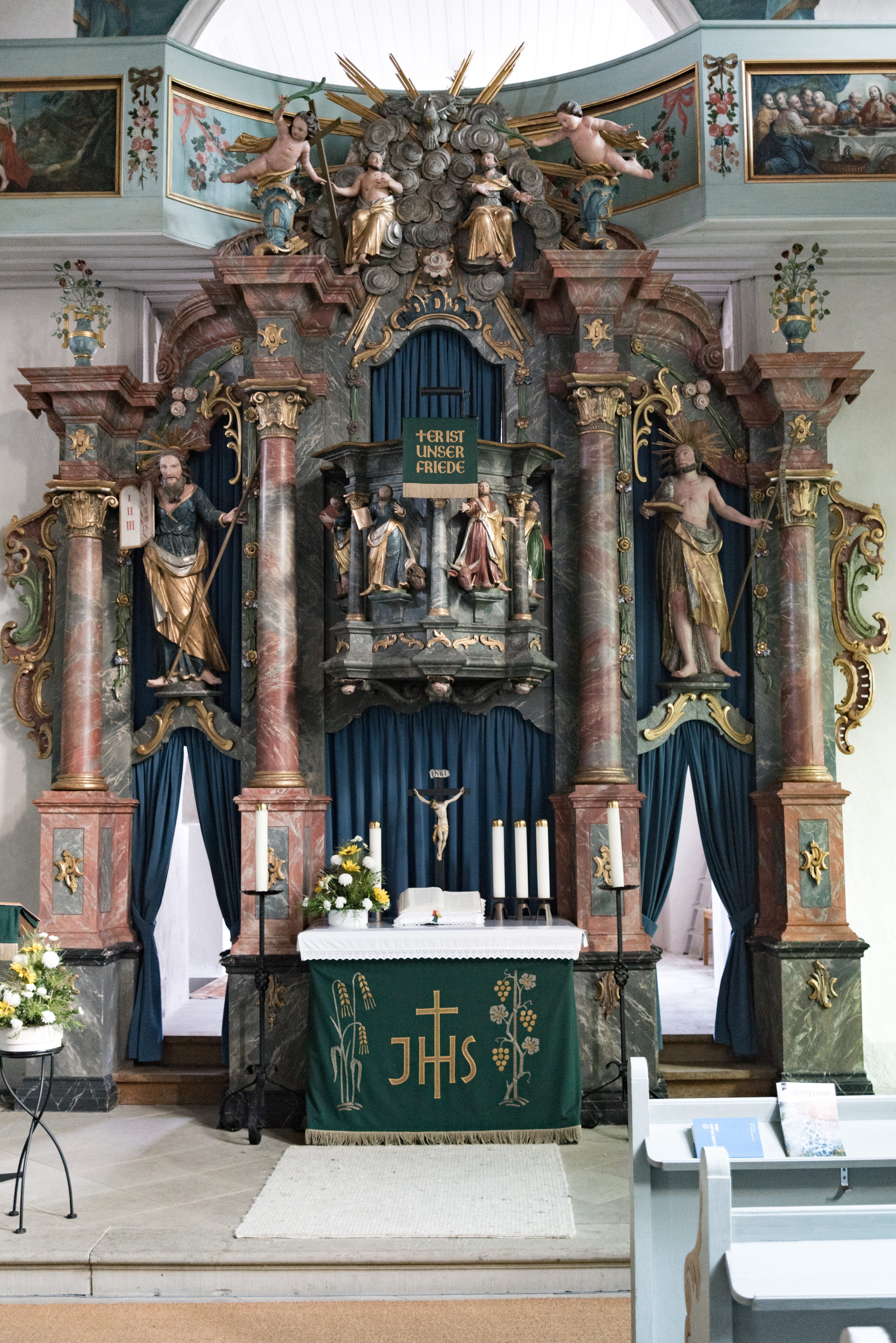 Sondheim vor der Rhön, Kirchberg 10, -Evang.-Luth. Pfarrkirche St. Michael